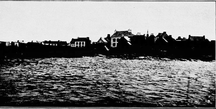 Molène en 1898 (photographie prise par Paul Gruyer, Ouessant, Enez Heussa, l'île de l'Epouvante)